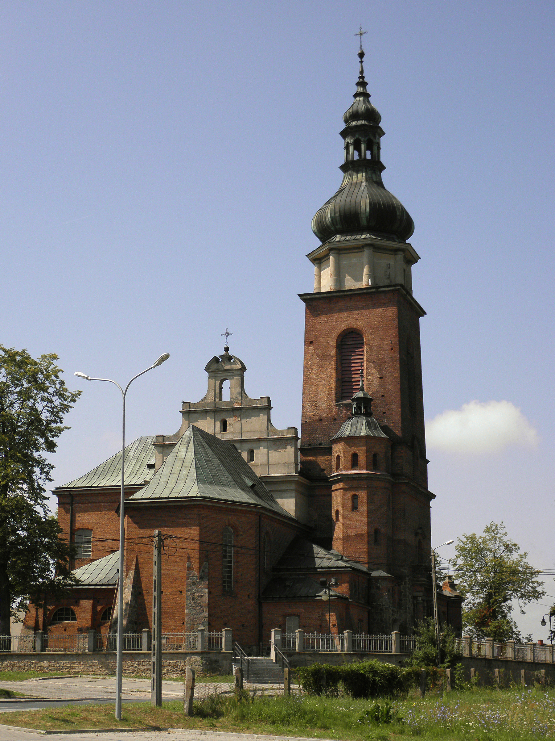 Cerekiew - kościół p.w. św.Stanisława Biskupa.